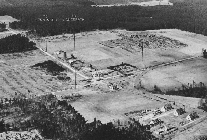 Losheimergraben, Germany